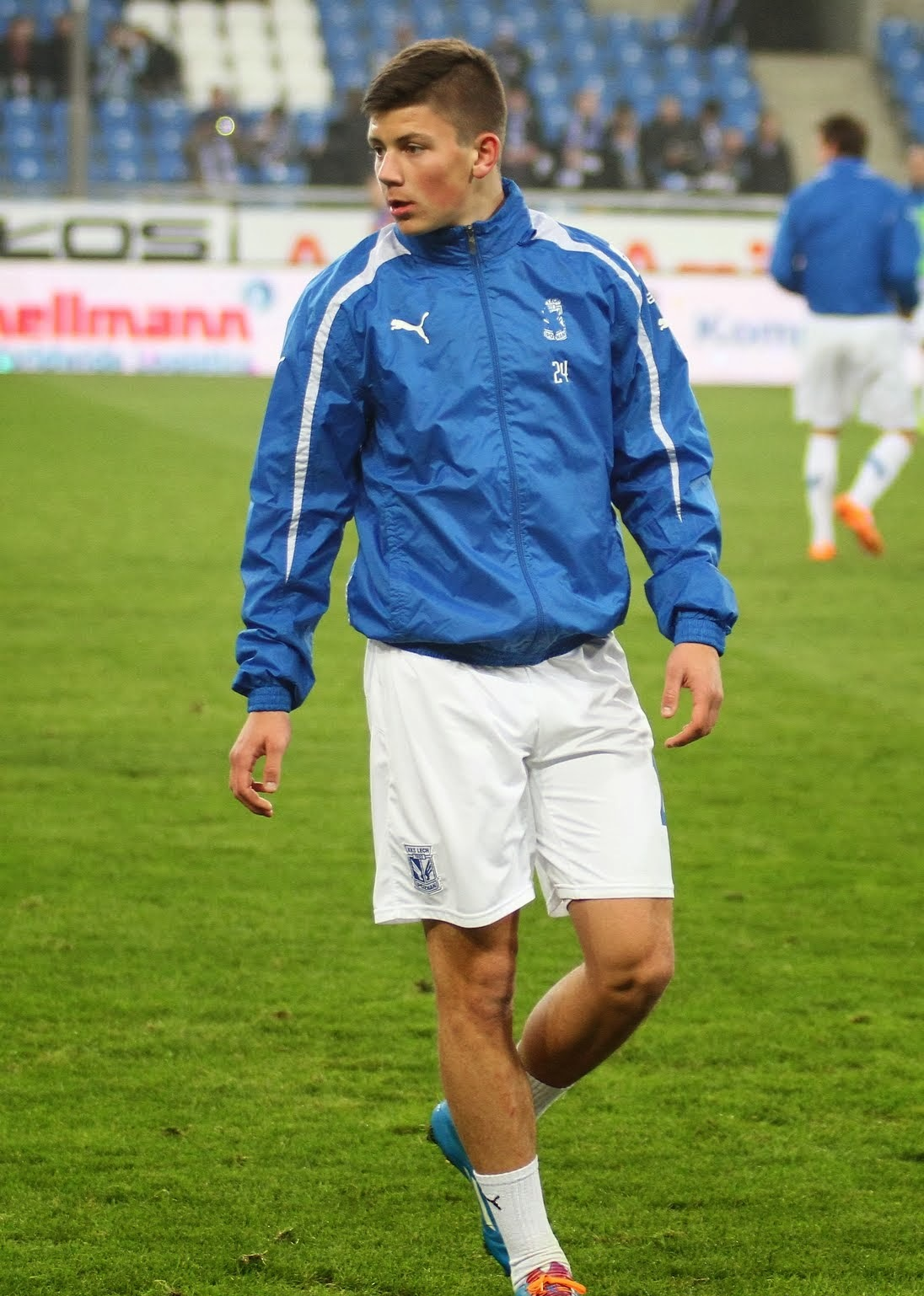 Dawid Kownacki w barwach Lecha Poznań